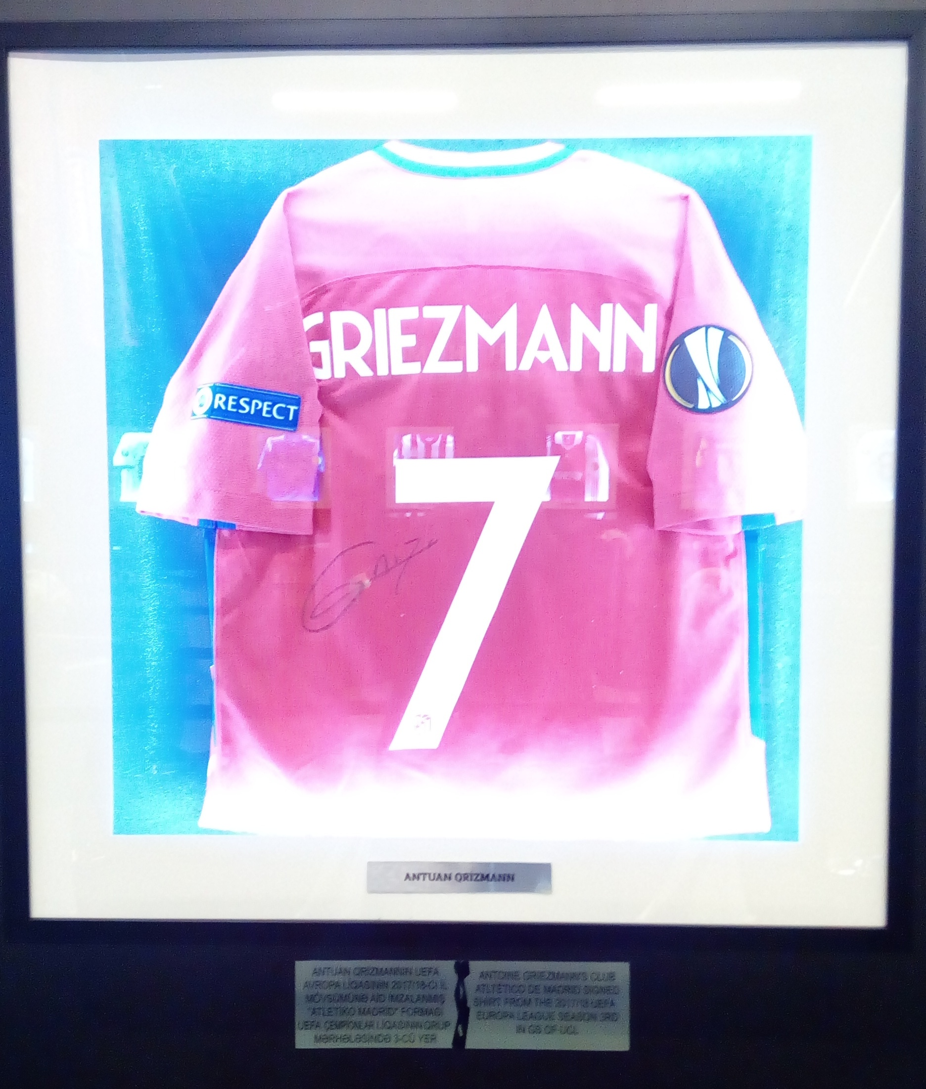 Avropa Liqası Muzeyi Bakıda